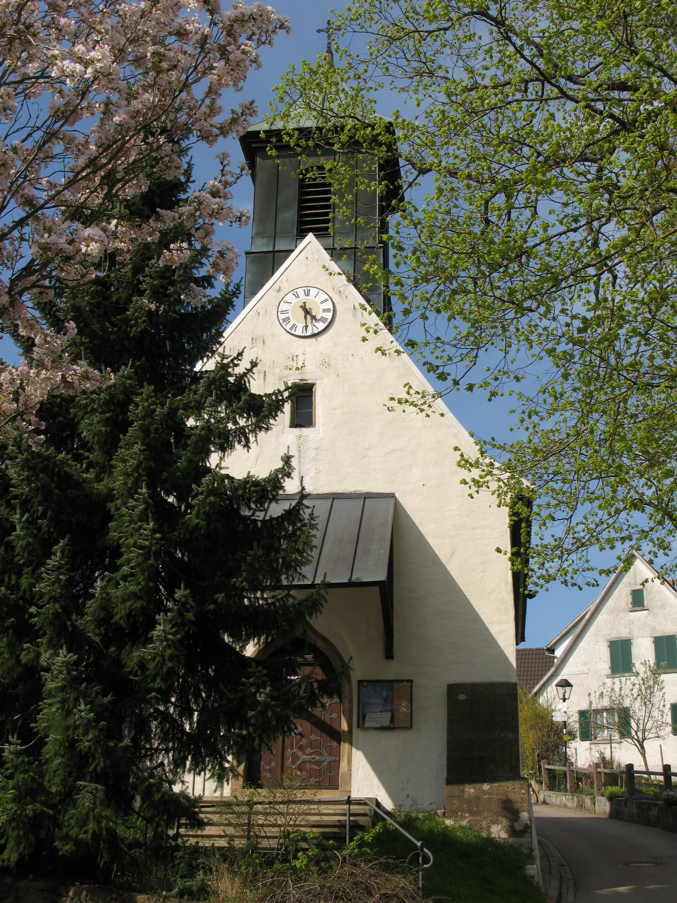 Evangelische Kirche von Muggardt am Fernwanderweg Markgräfler Wiiwegli im Markgräflerland.